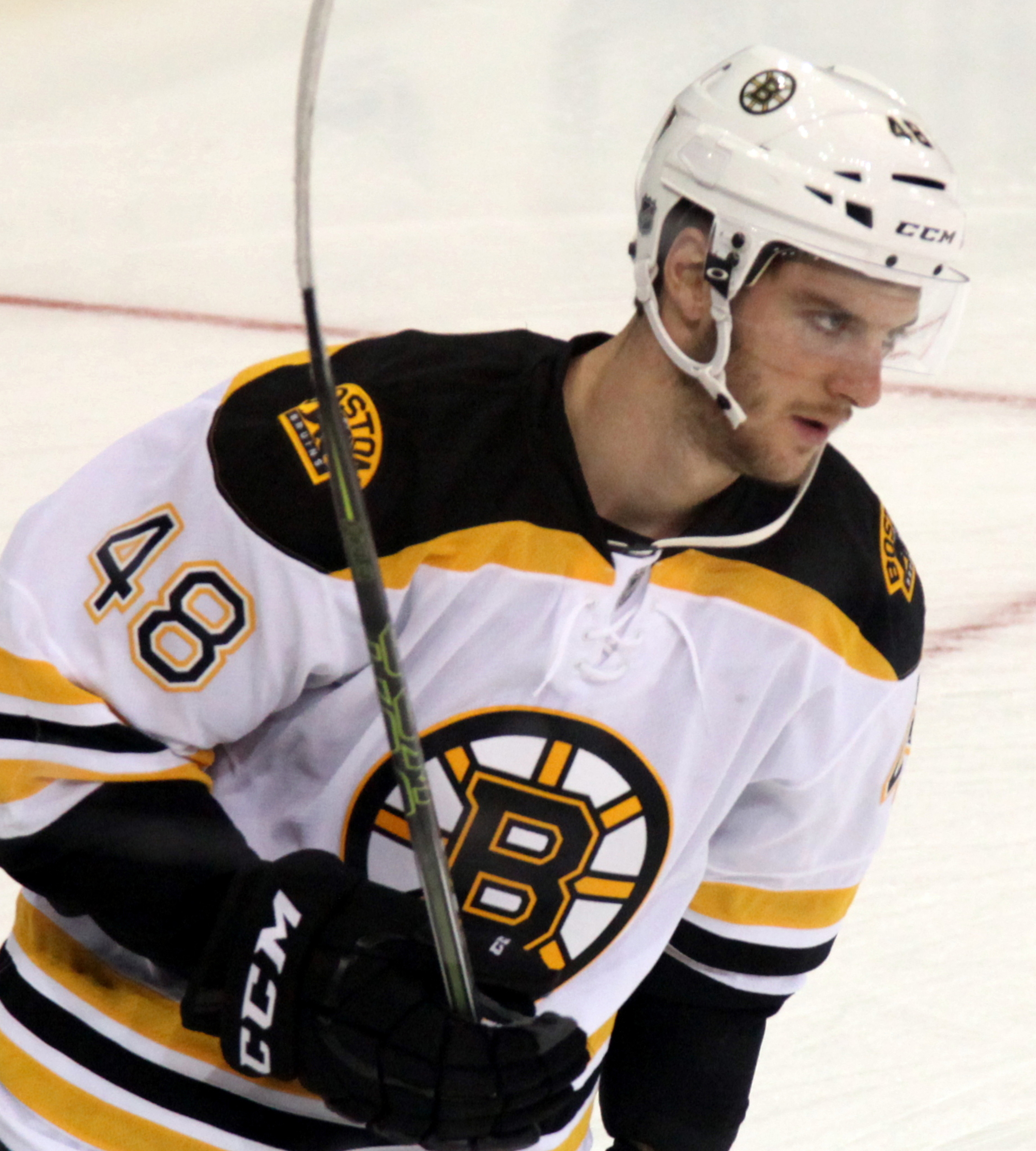 Miller in September 2015.